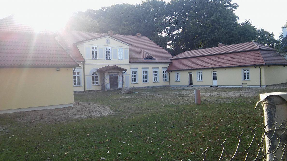 Witków - dwór.